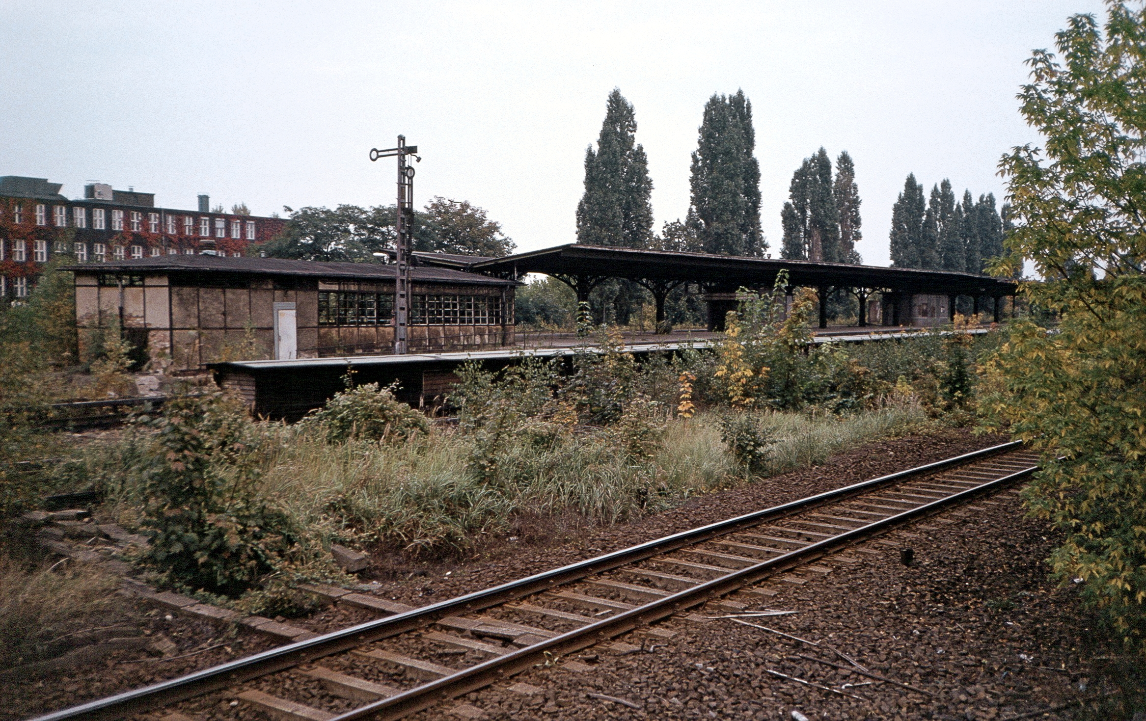 S-Bhf. Jungfernheide